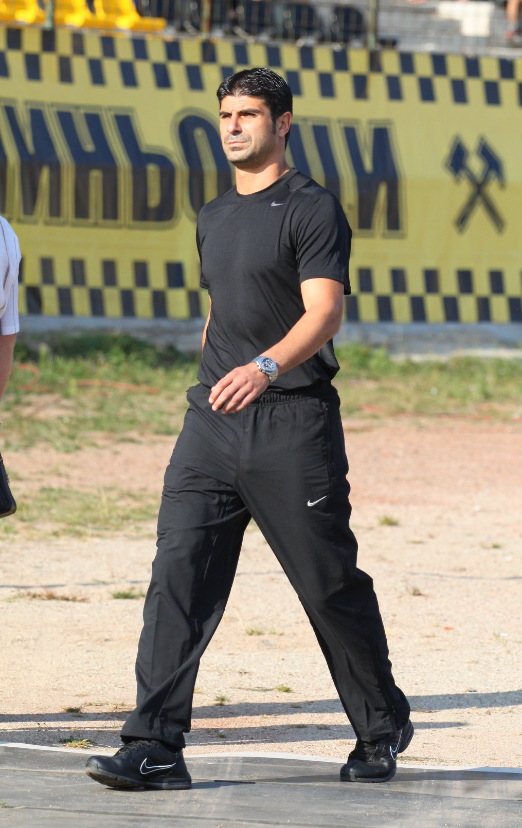 Георги Иванов като старши треньор на Левски, по време на гостуването на отбора на ПФК Миньор Перник, 11 септември 2011 г.